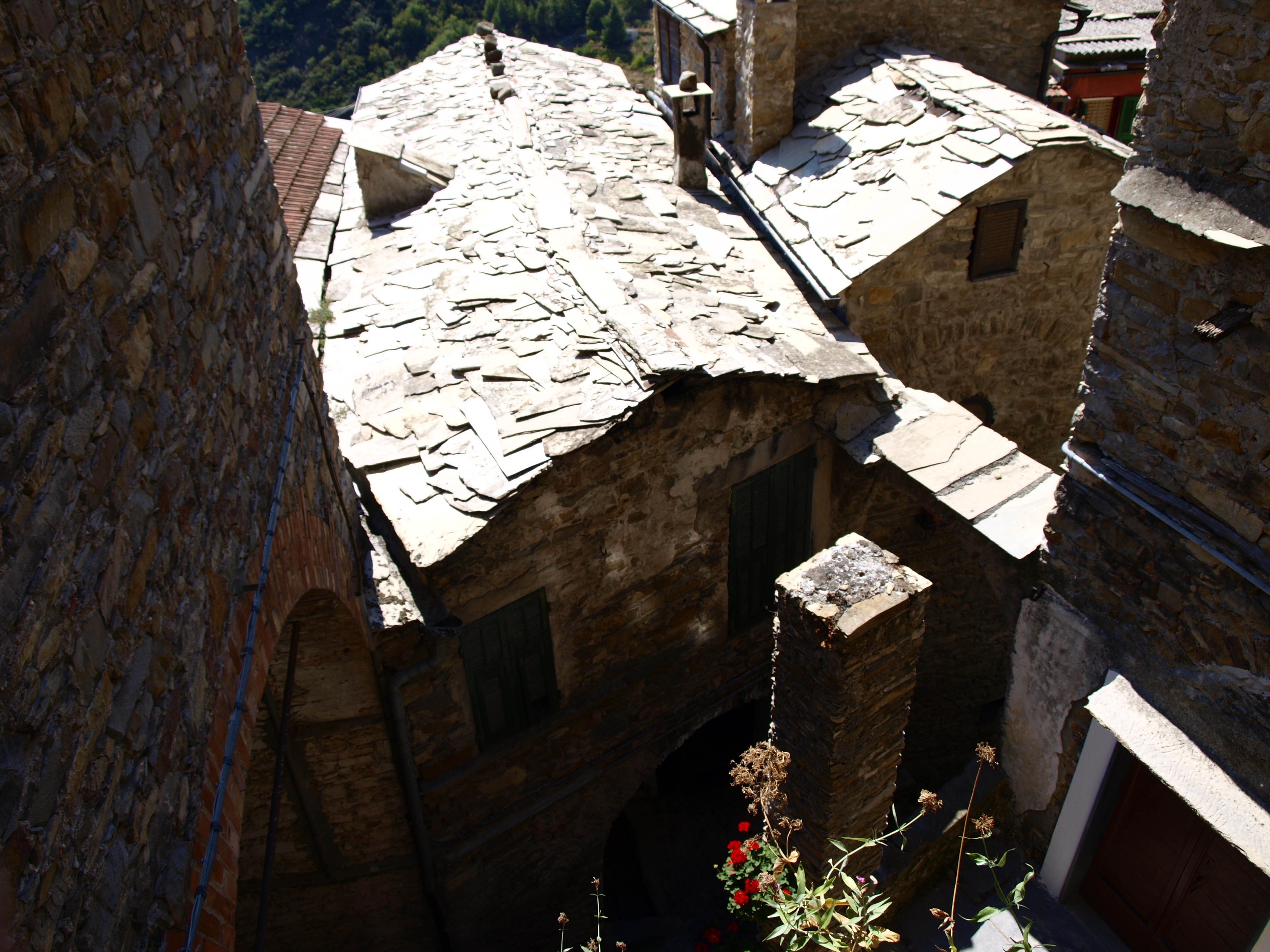 18010 Montalto Ligure IM, Italy